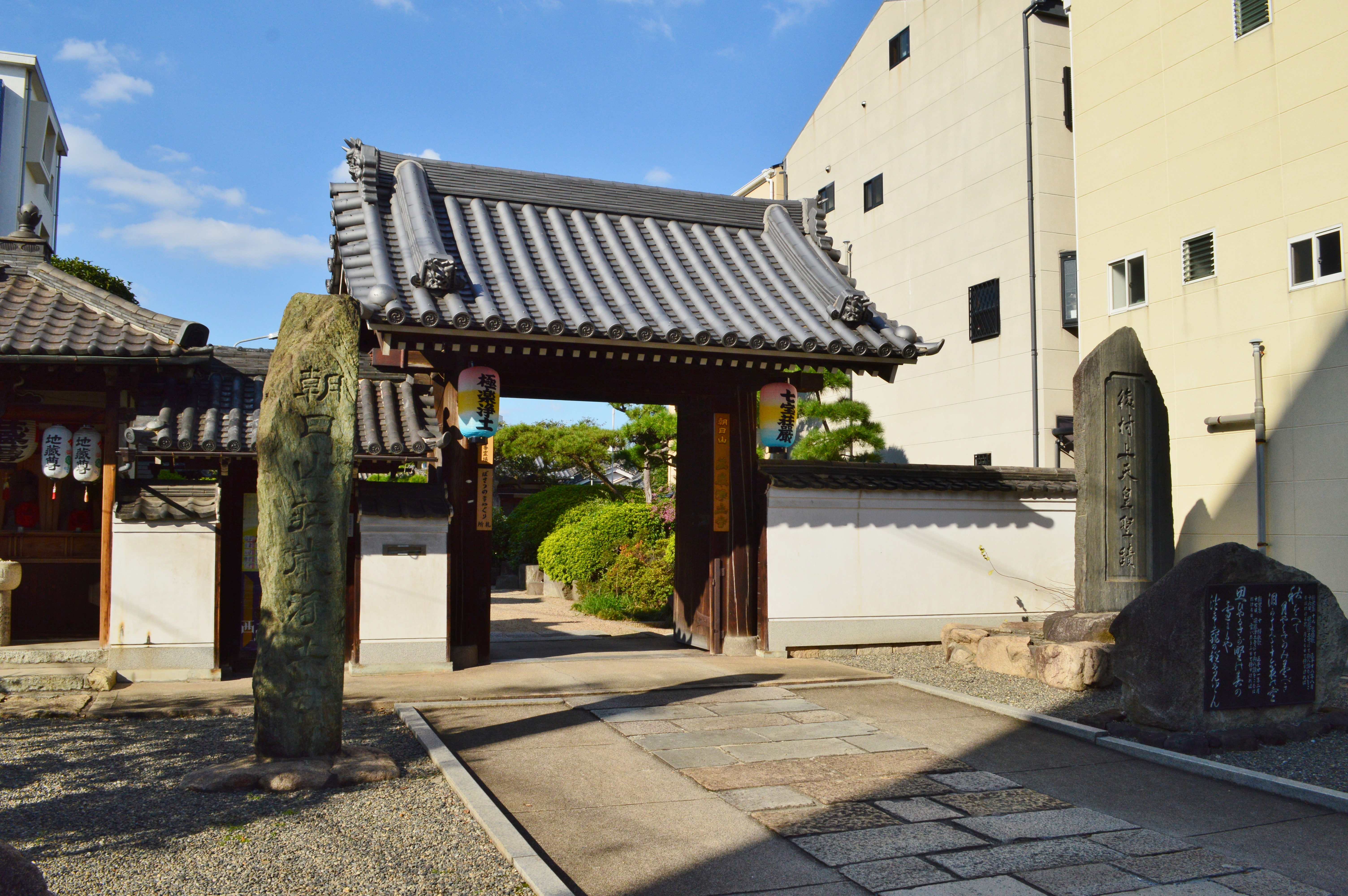 荘厳浄土寺 山門